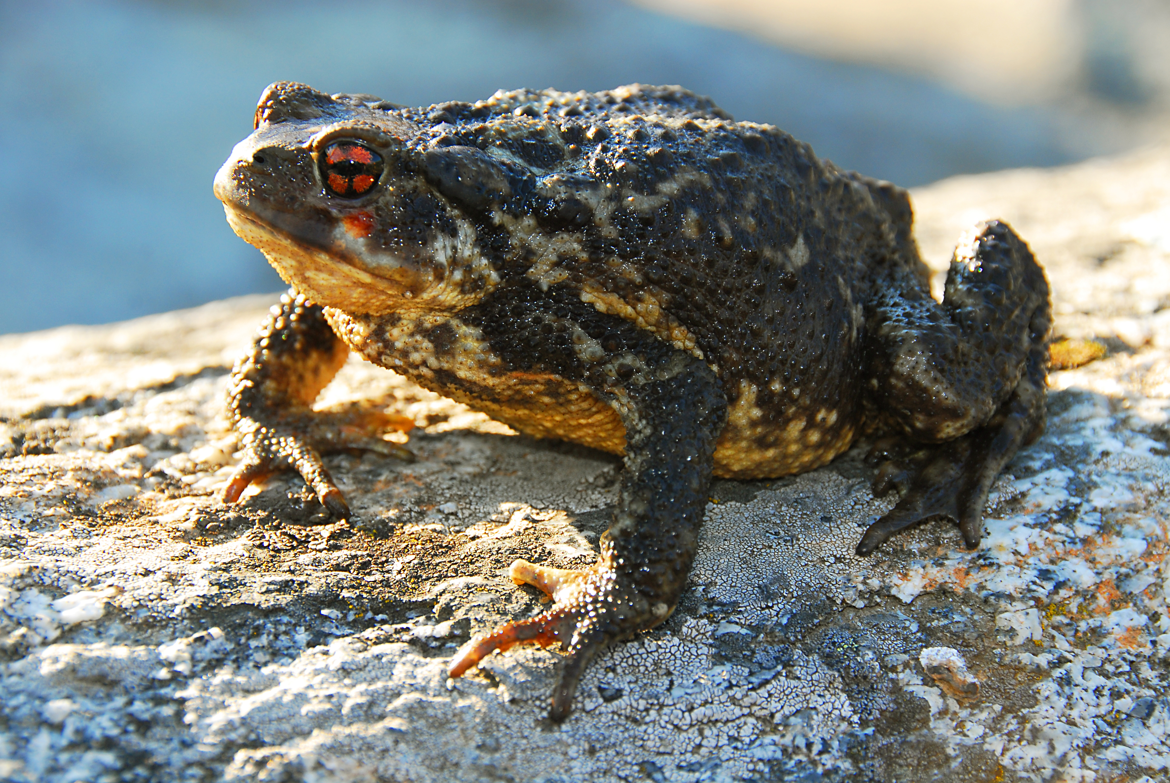 Sapo común